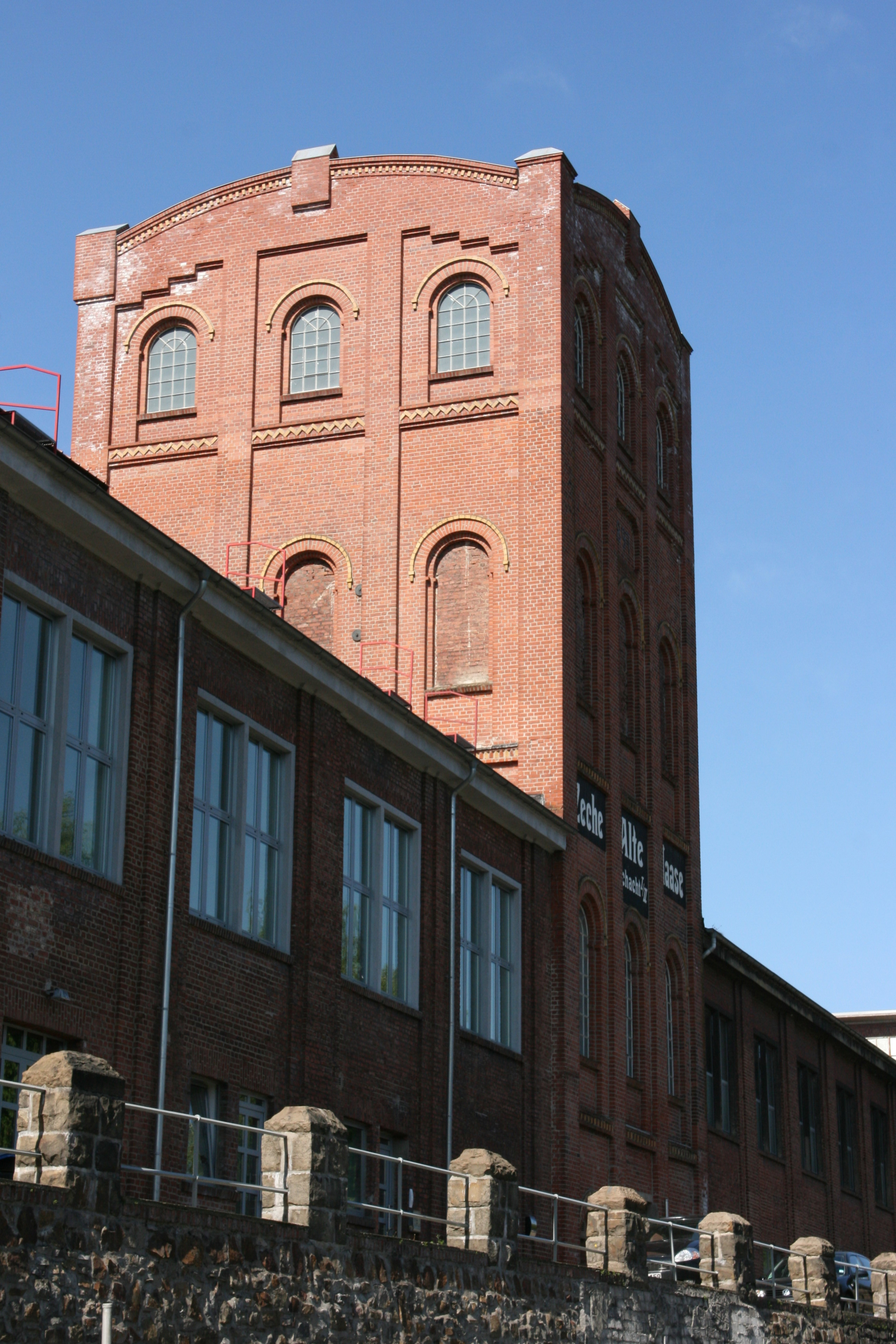 Malakow-Turm über Schacht I/II (Schacht Julie) der Zeche Alte Haase, Hattinger Straße in Sprockhövel